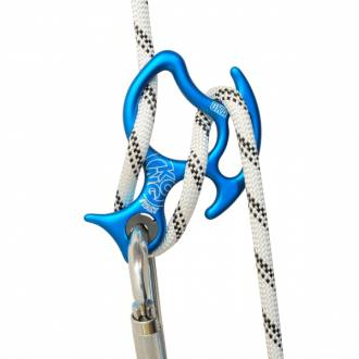 Discesore OKA Kong spa studiato per il torrentismo anche in situazioni di emergenza, recupero e soccorso